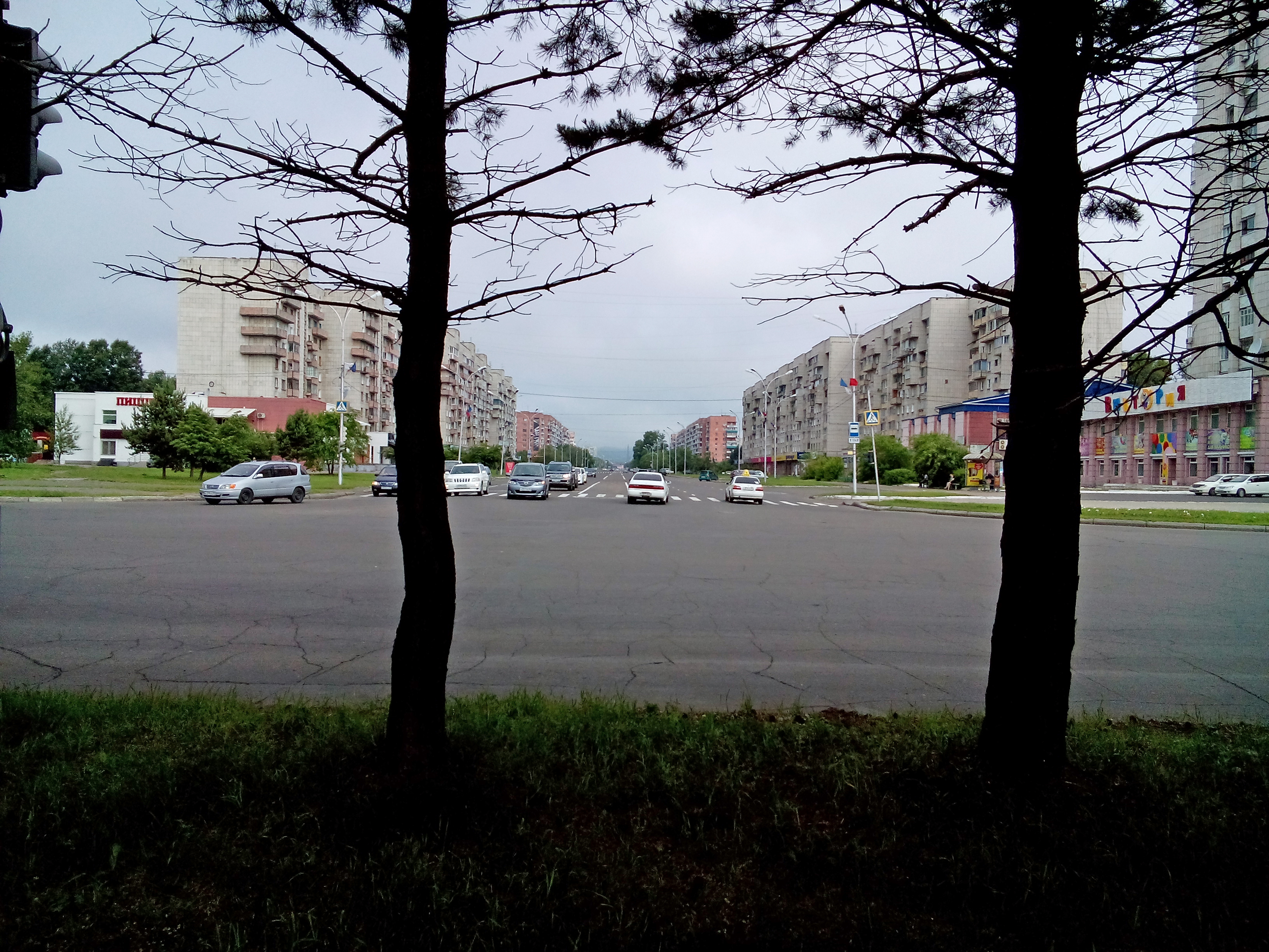 Проспект Первостроителей в Комсомольске-на-Амуре